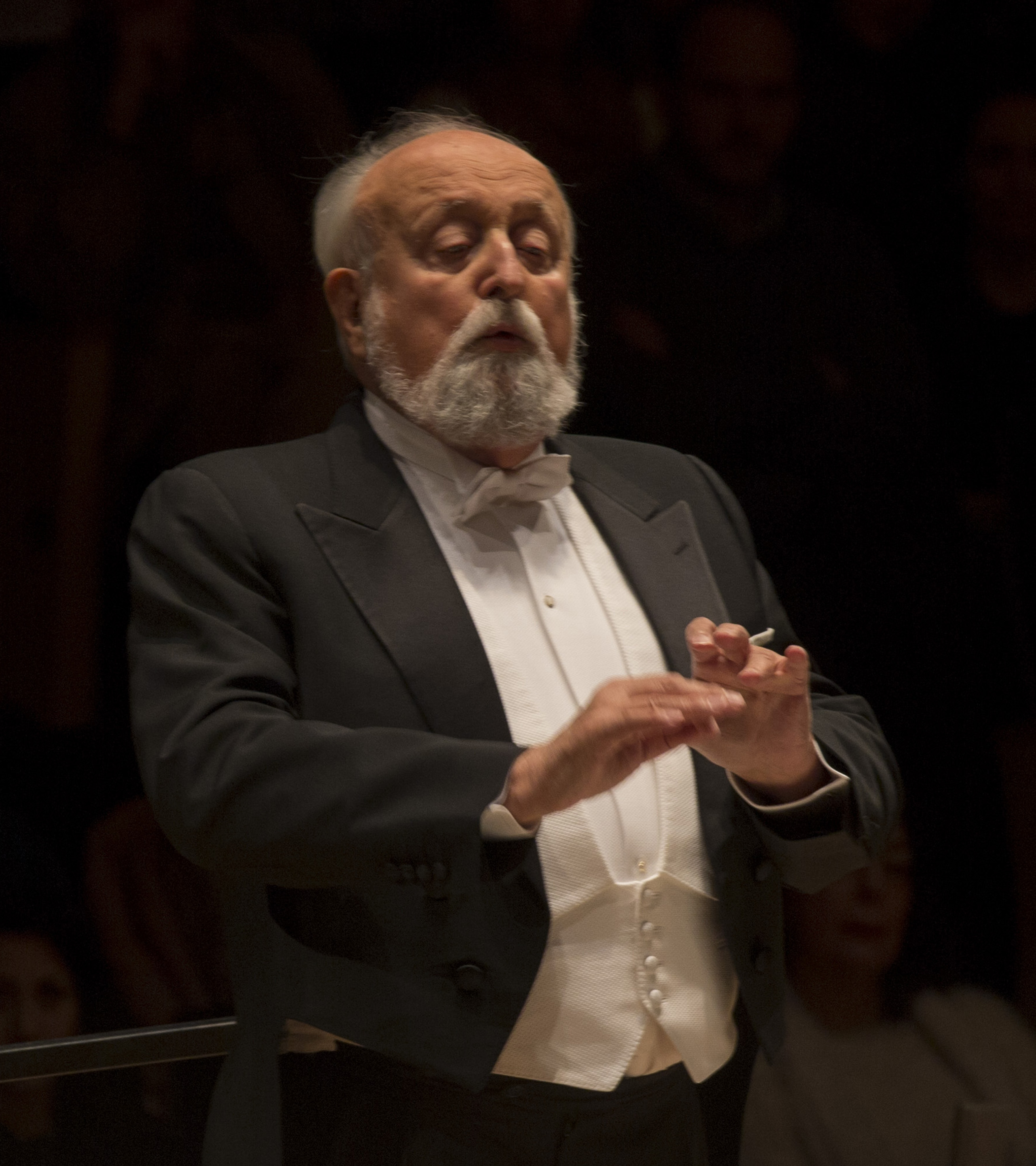 Buenos Aires, 2 de septiembre de 2016 - Krzysztof Penderecki dirigió a la Orquesta Sinfónica Nacional, en la Sala Sinfónica del CCK. Fotos: Romina Santarelli / Ministerio de Cultura de la Nación.